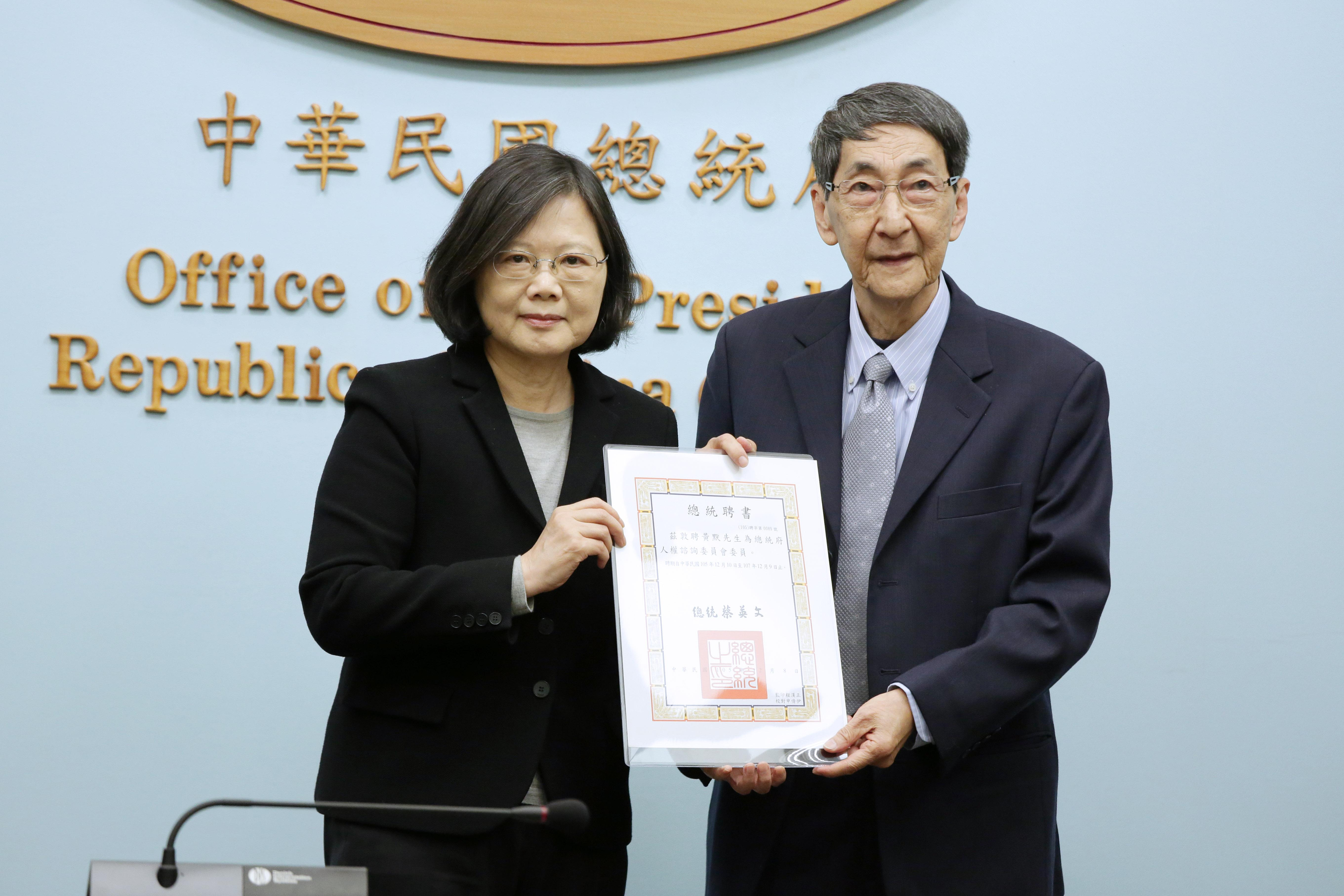 中華民國總統蔡英文（左）出席「總統府人權諮詢委員會第二十五次委員會議」並頒發總統聘書，由本屆人權諮詢委員東吳大學政治學系教授黃默（右）代表接受。總統聘書下方蓋印總統之印。